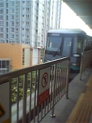 Camera: Panasonic EB-GD88